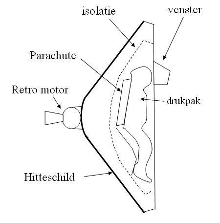 schets nagetekend naar oorspronkelijk concept.